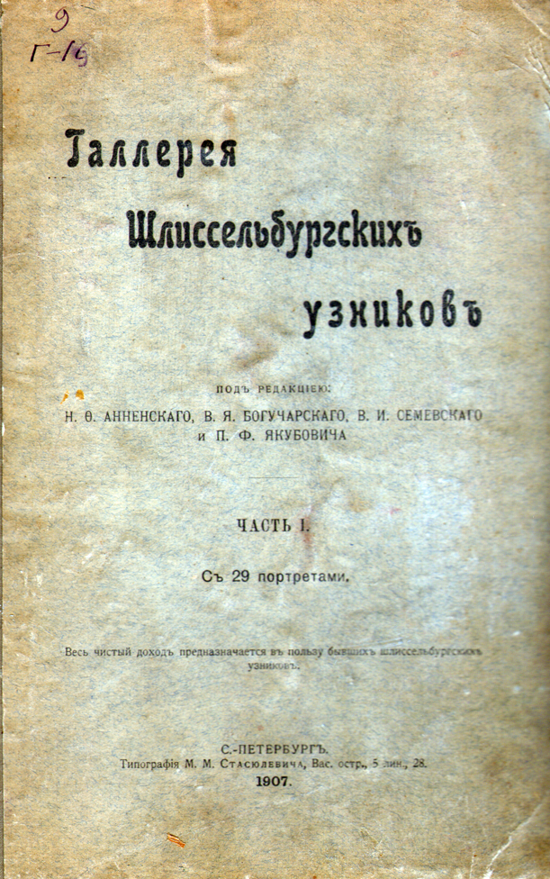 «Галлерея шлиссельбургских узников», 1907 г.